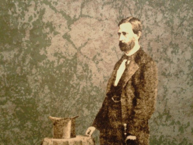 Pintura de 1856 de Luis Molina Bedoya, embajador costarricense en Washington durante la Campaña Nacional de 1856-1857.